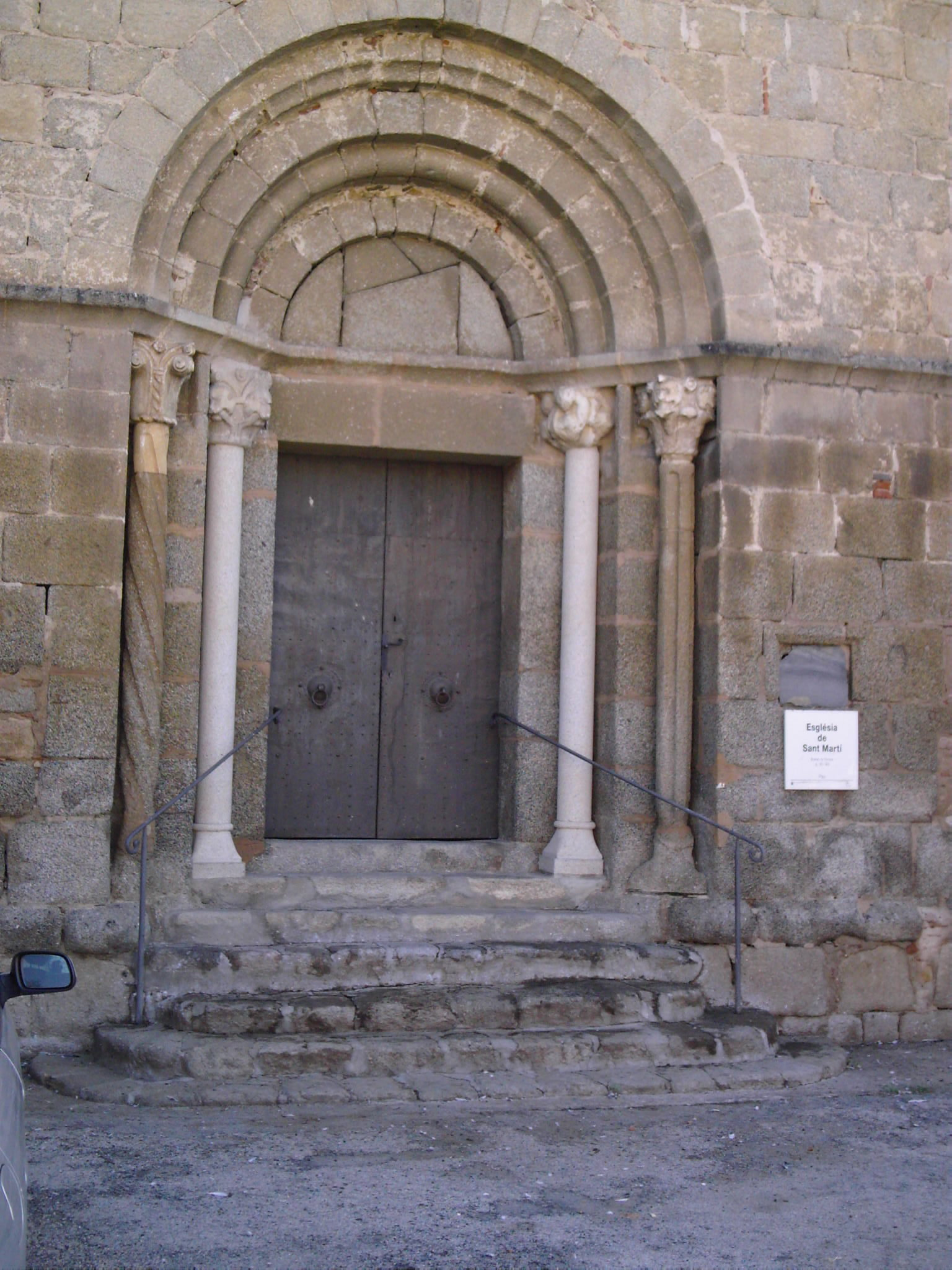 église de Pau (Alt Empordà)